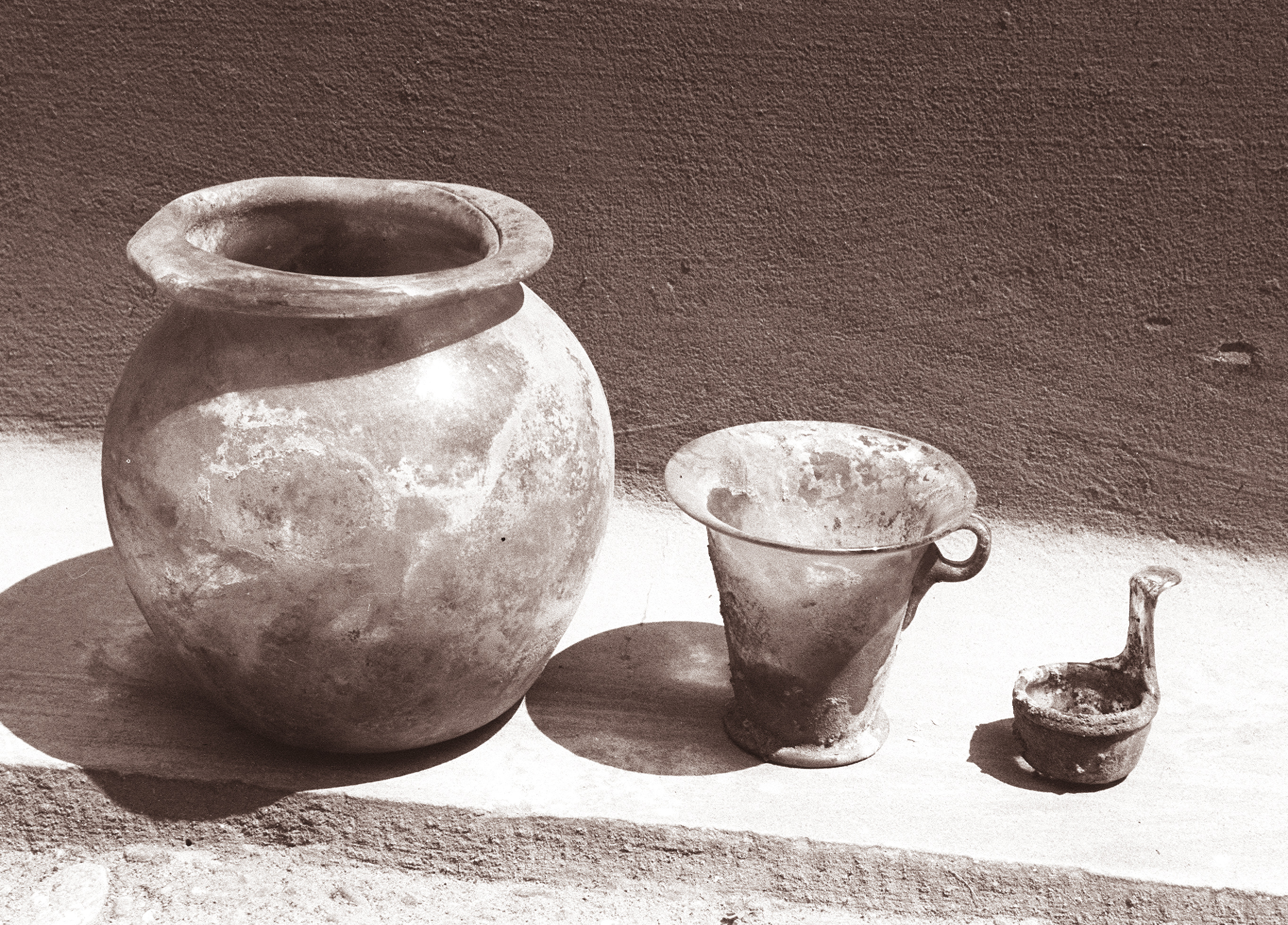 Najdene žare v rimski grobnici iz prvega stoletja našega štetja v Miklavžu na Dravskem polju